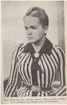 Llegada de Marie Curie a París en 1891, para estudiar en La Sorbona.